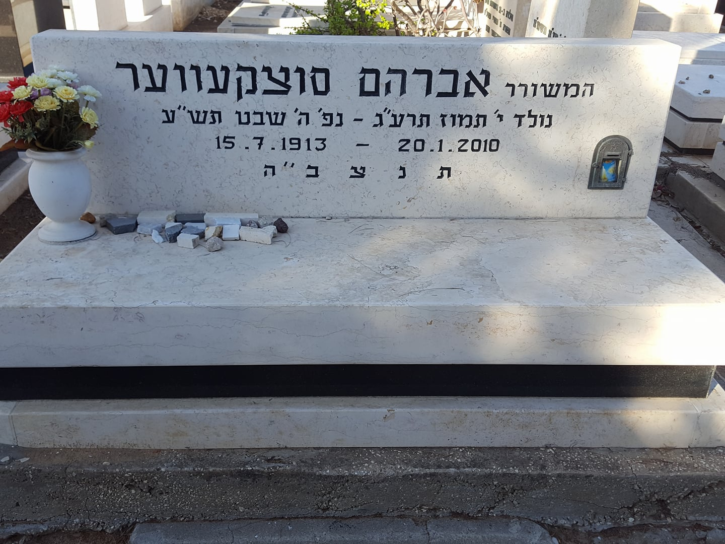 קברו של המשורר אברהם סוצקעווער בבית העלמין בקרית שאול צילום אלי אלון